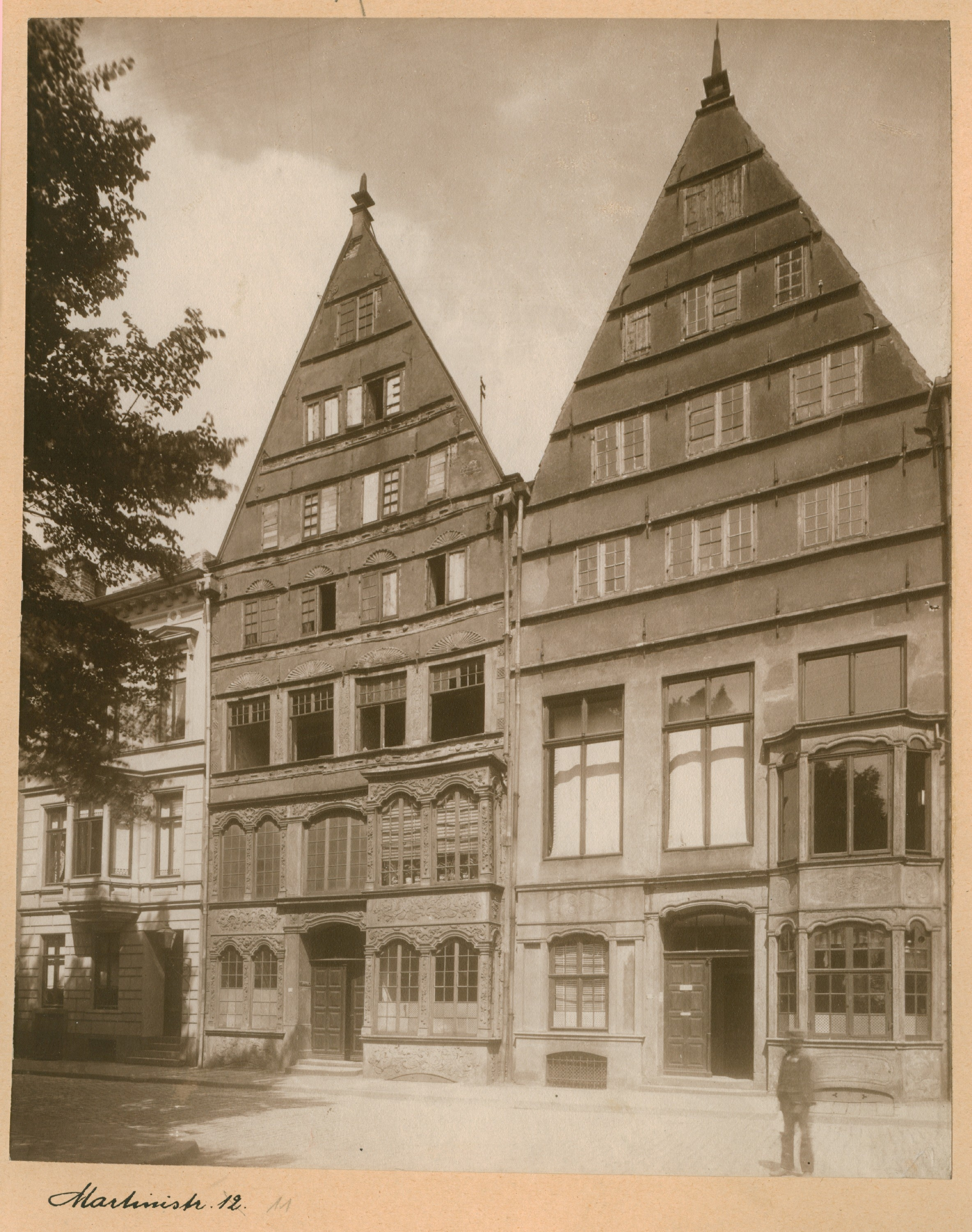 Haus Martinistraße 11 (1750–1897), Ursprung der Rokokofassade des heutigen Hauses Martinistraße 27 in BremenDas abgebildete Objekt ist ein geschütztes Kulturdenkmal in der Freien Hansestadt Bremen, mit der Nr. 0877 beim Landesamt für Denkmalpflege registriert.